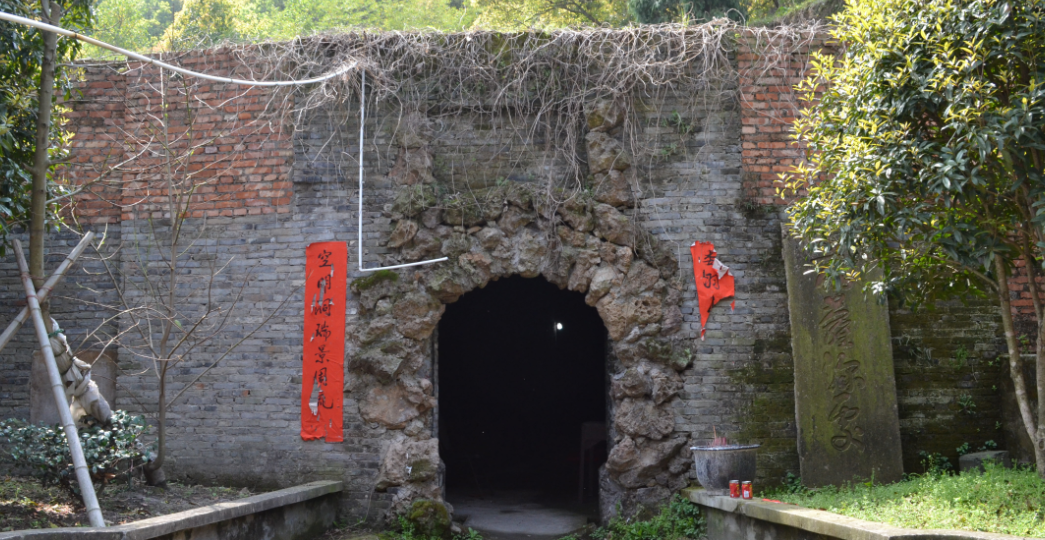 委羽山古山洞